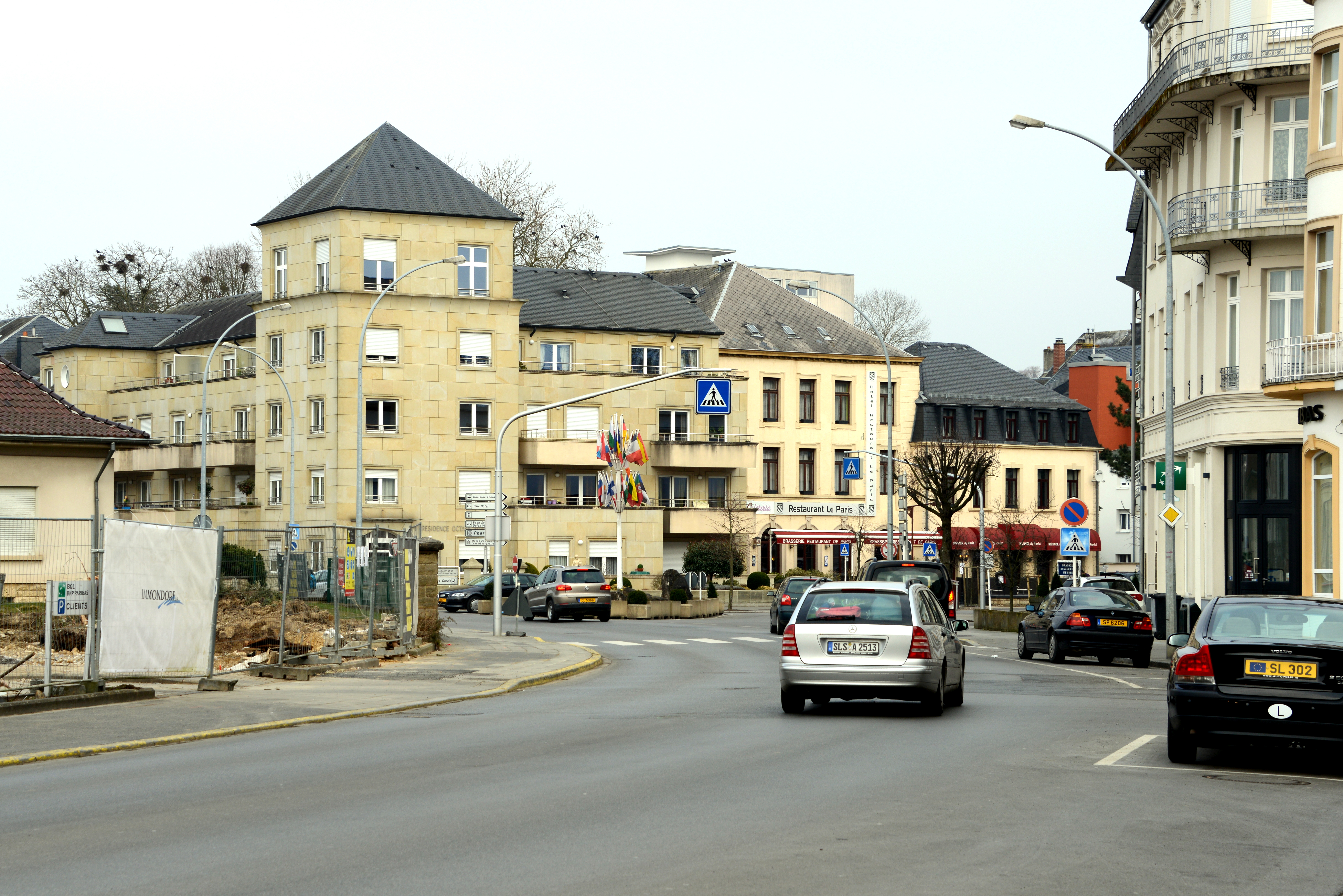 D'Avenue Frantz-Clément zu Munneref.